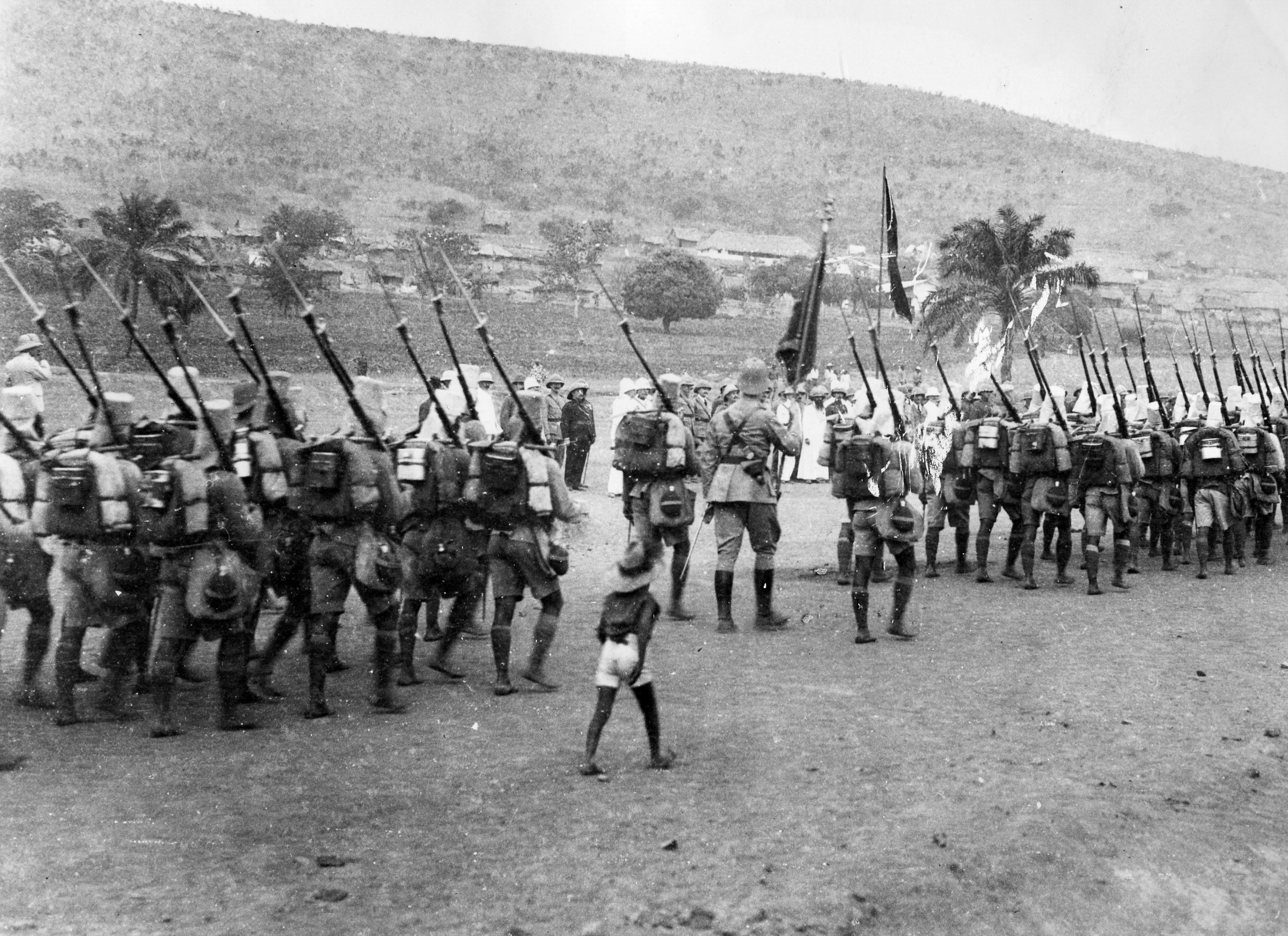 Defilé van Force Publique in Kilosa, klaar voor Mahenge